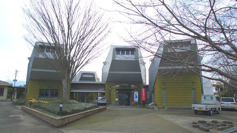 湯前町立湯前まんが美術館 建築概要 設計― 桂英昭 竣工― 1992年 敷地面積― 9,023m² 建築面積― m² 延床面積― 1,246m² 構造― 木造 規模― 地上2階 所在地― 受賞― くまもとアートポリス参加作品 撮影者/著者/著作権保有者 : MK Products 撮影日 : 2007/03/14